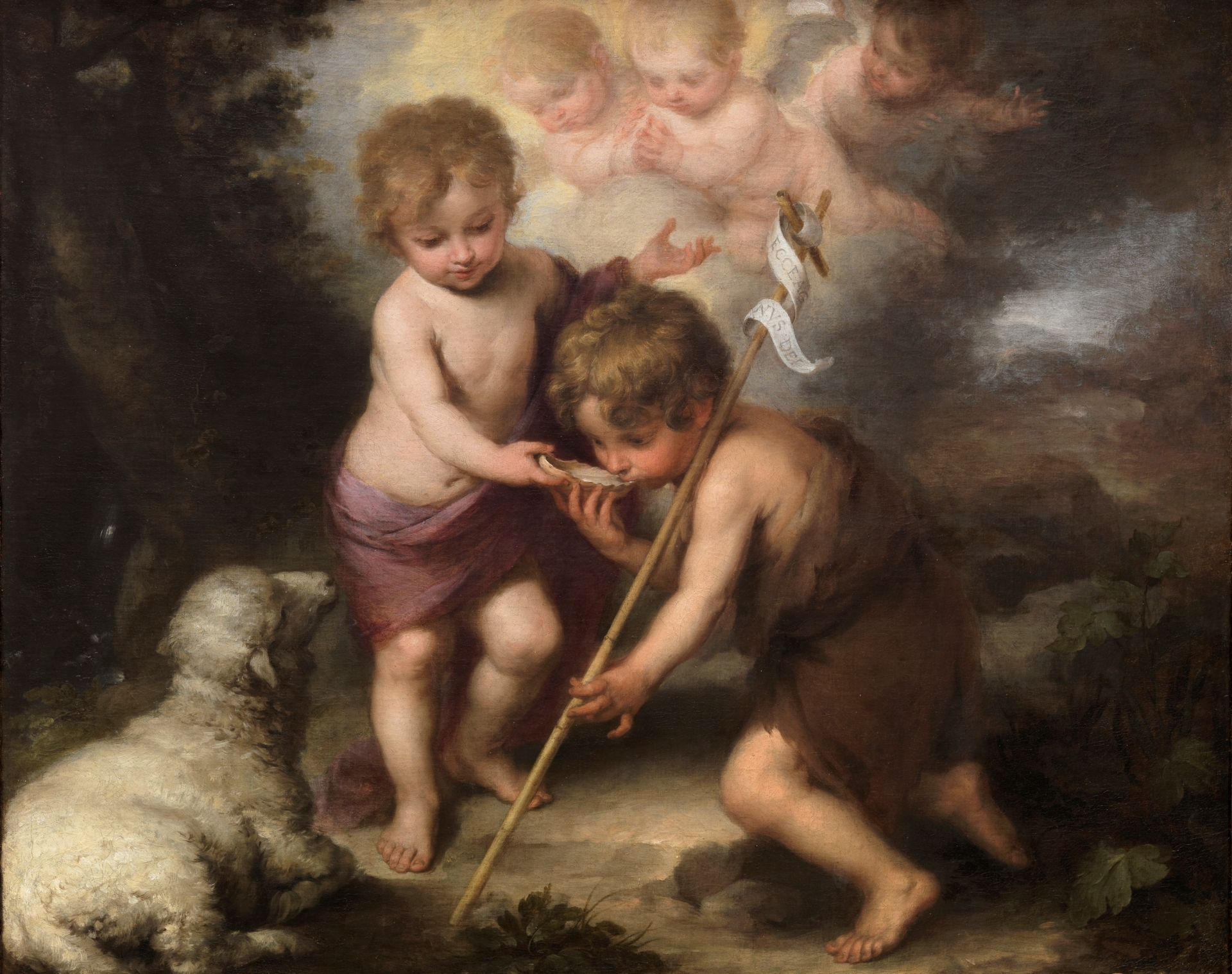 La obra representa al Niño Jesús dando de beber agua en una concha a su primo, el profeta San Juan Bautista.